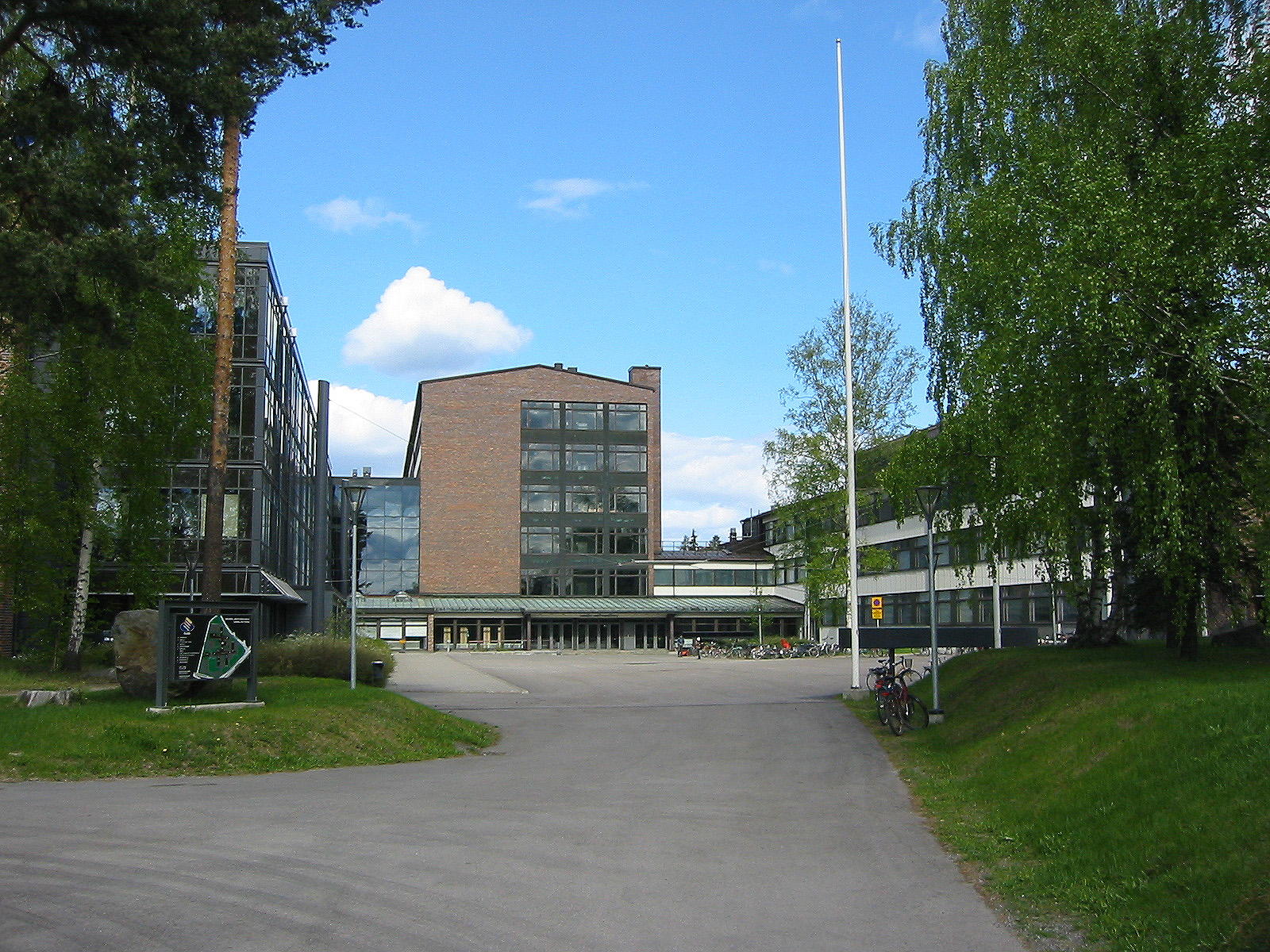 Tampereen ammattikorkeakoulu (TAMK), pääsisäänkäynti. TAMK University of Applied Sciences, main entrance. self taken.